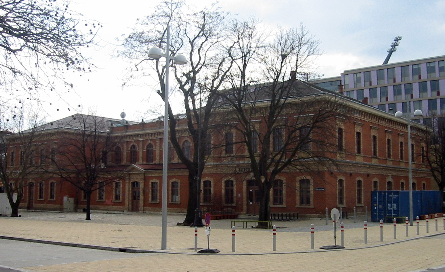 Media Quarter Marx 1